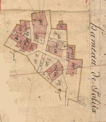 Polig, de Cameles, en el Cadastre napoleònic del 1812 (Arxius Departamentals dels Pirineus Orientals)